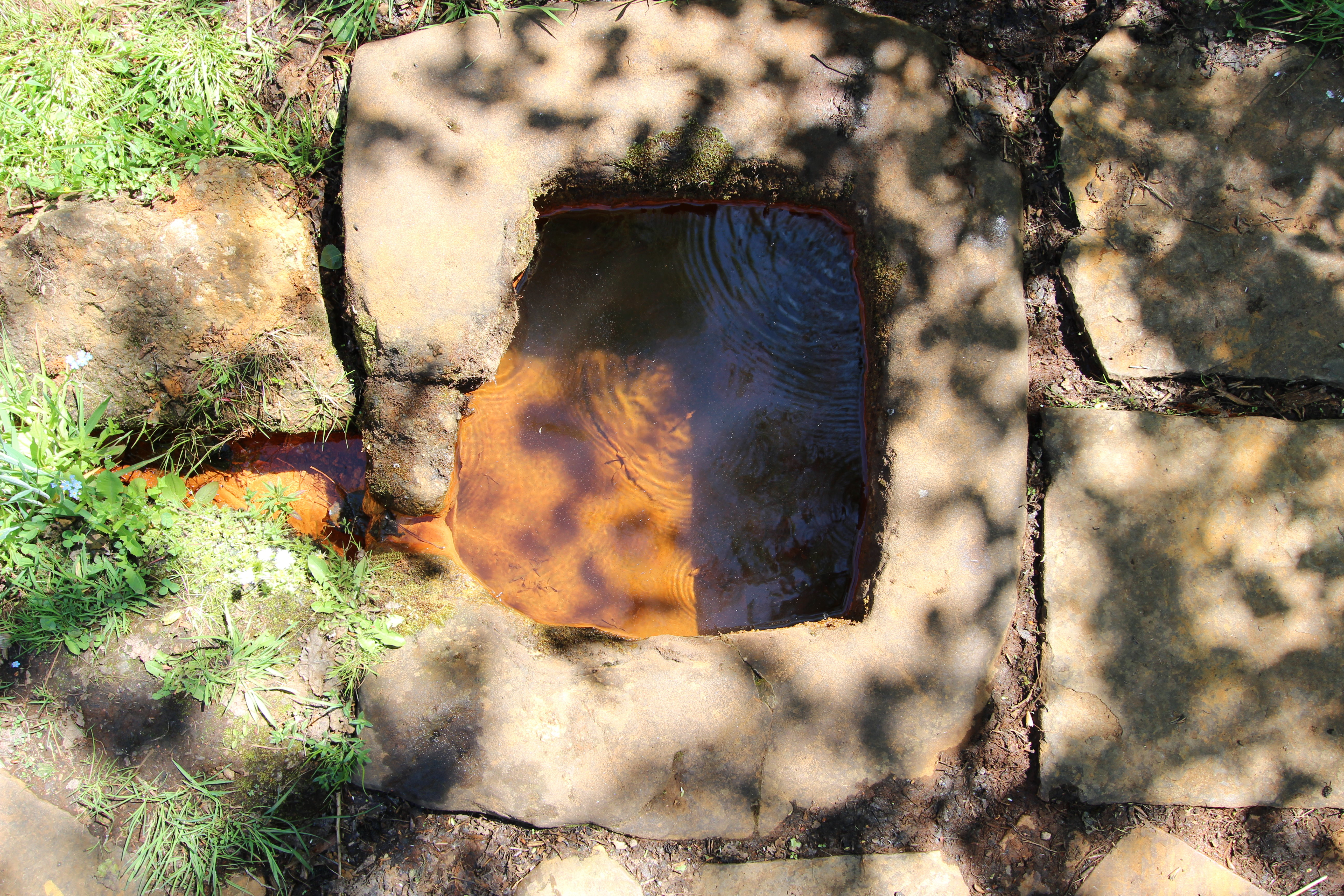 54597 Steffeln; südlich von Steffeln, an der Landstraße 24 zwischen Steffeln und Duppach. Die natürliche Mineralquelle ist ca. 300m westlich vom Eichholzmaar fußläufig erreichbar. Aufnahme von 2017.